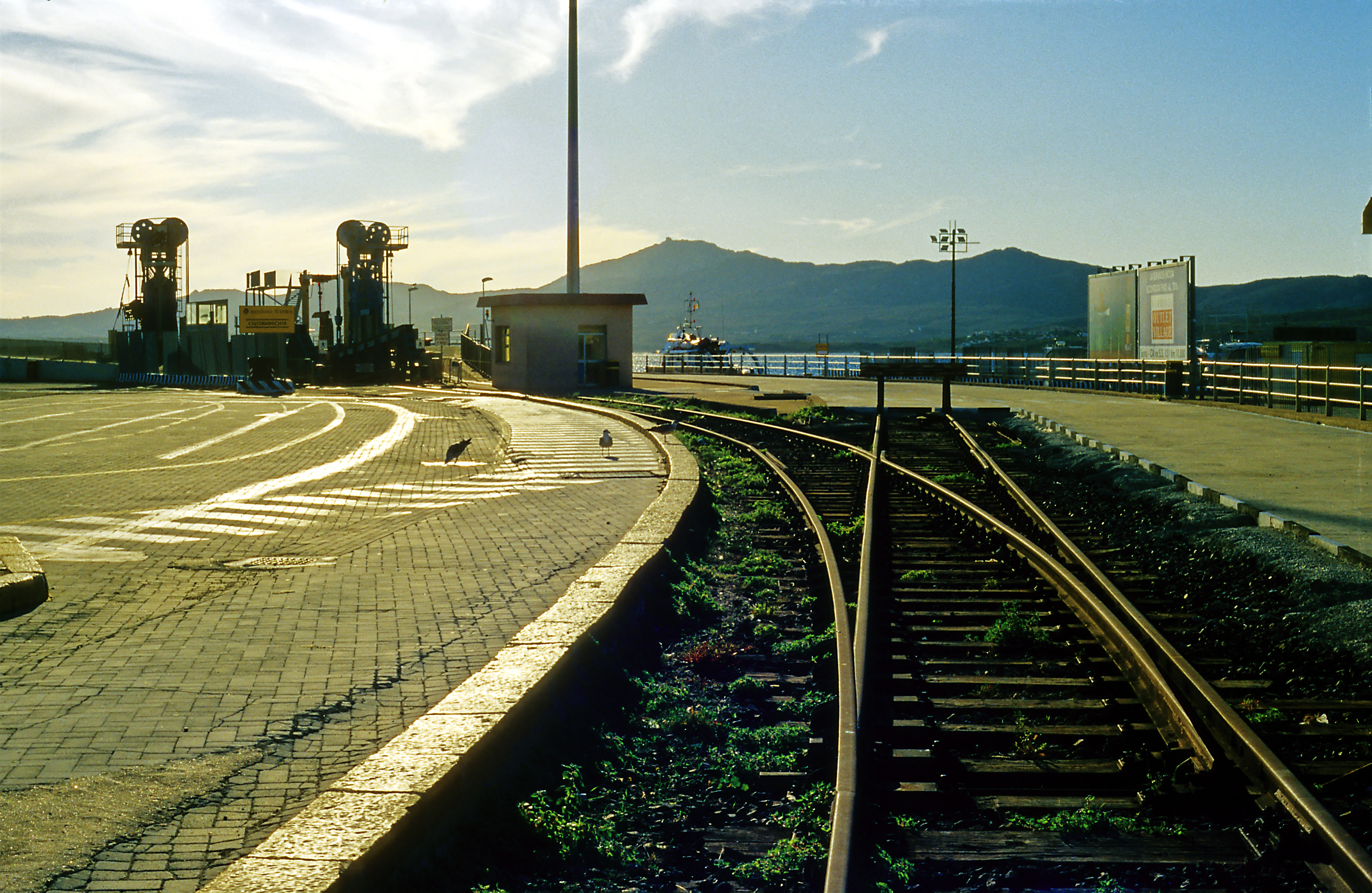 Dieses Fährbett ist nicht mehr in Betrieb und bereits abgebunden.